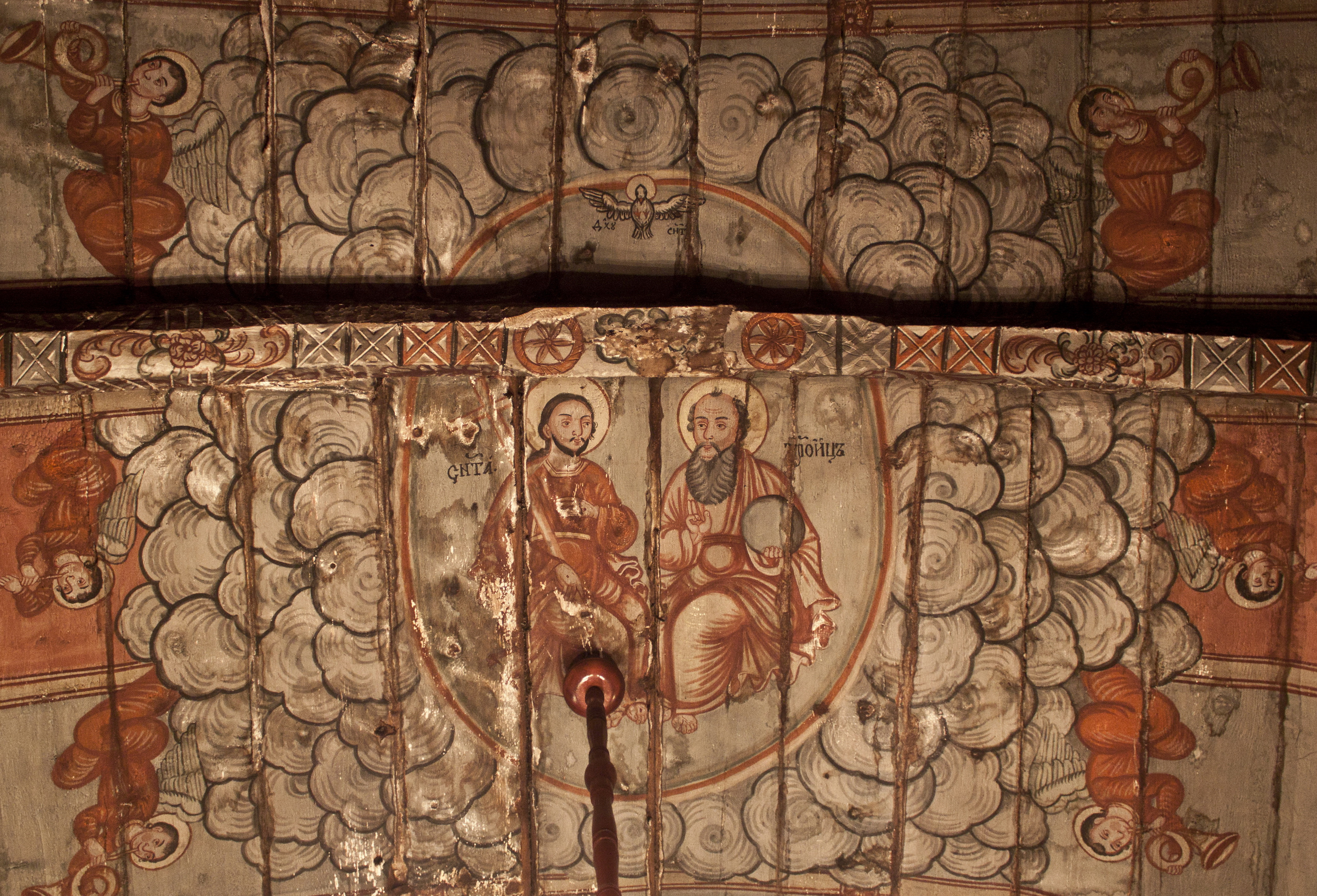 Biserica de lemn din Ulciug, judeţul Sălaj. Sfânta Troiţă. Pictura bolţii naosului.